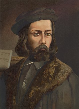 D.Blasco de Garay (1500-1552), capitan de la Armada e inventor español.